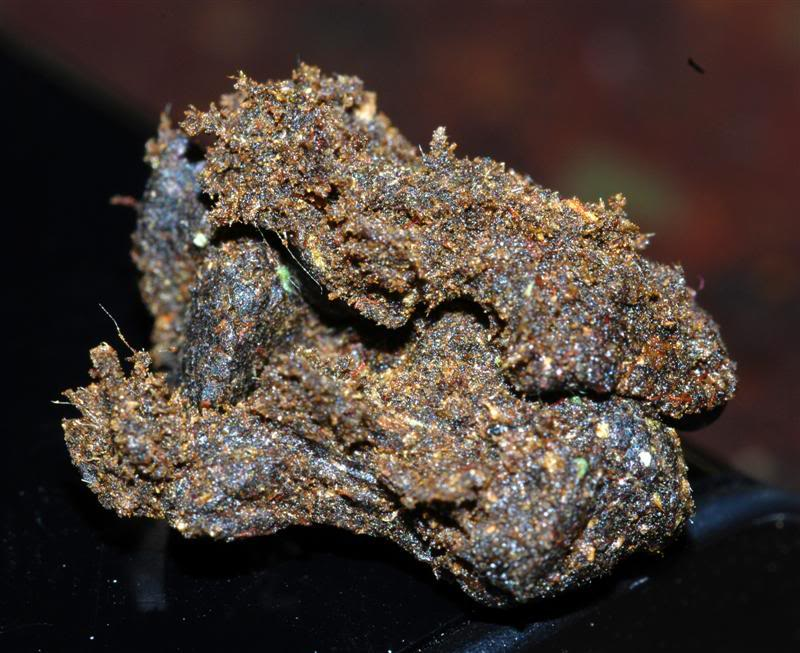 Foto Charas, tipo di Hashish indiano. Copyright free.